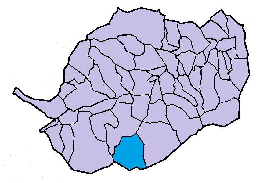 Mentet en el Conflent, a partir del mapa municipal del Conflent de lliure disposició adaptat al Nomenclàtor toponímic aprovat el 2007